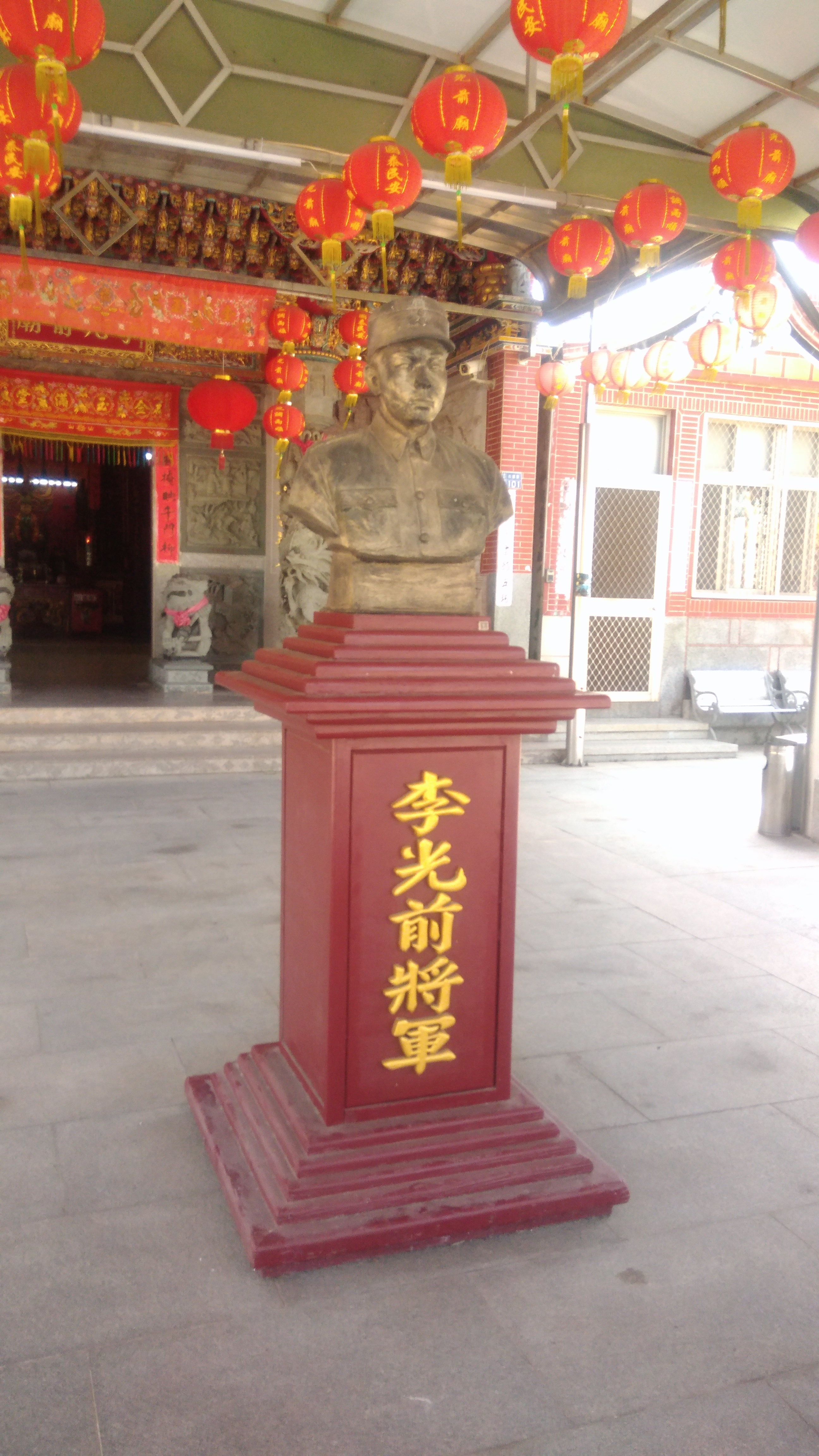 中文（台灣）: 李光前將軍像